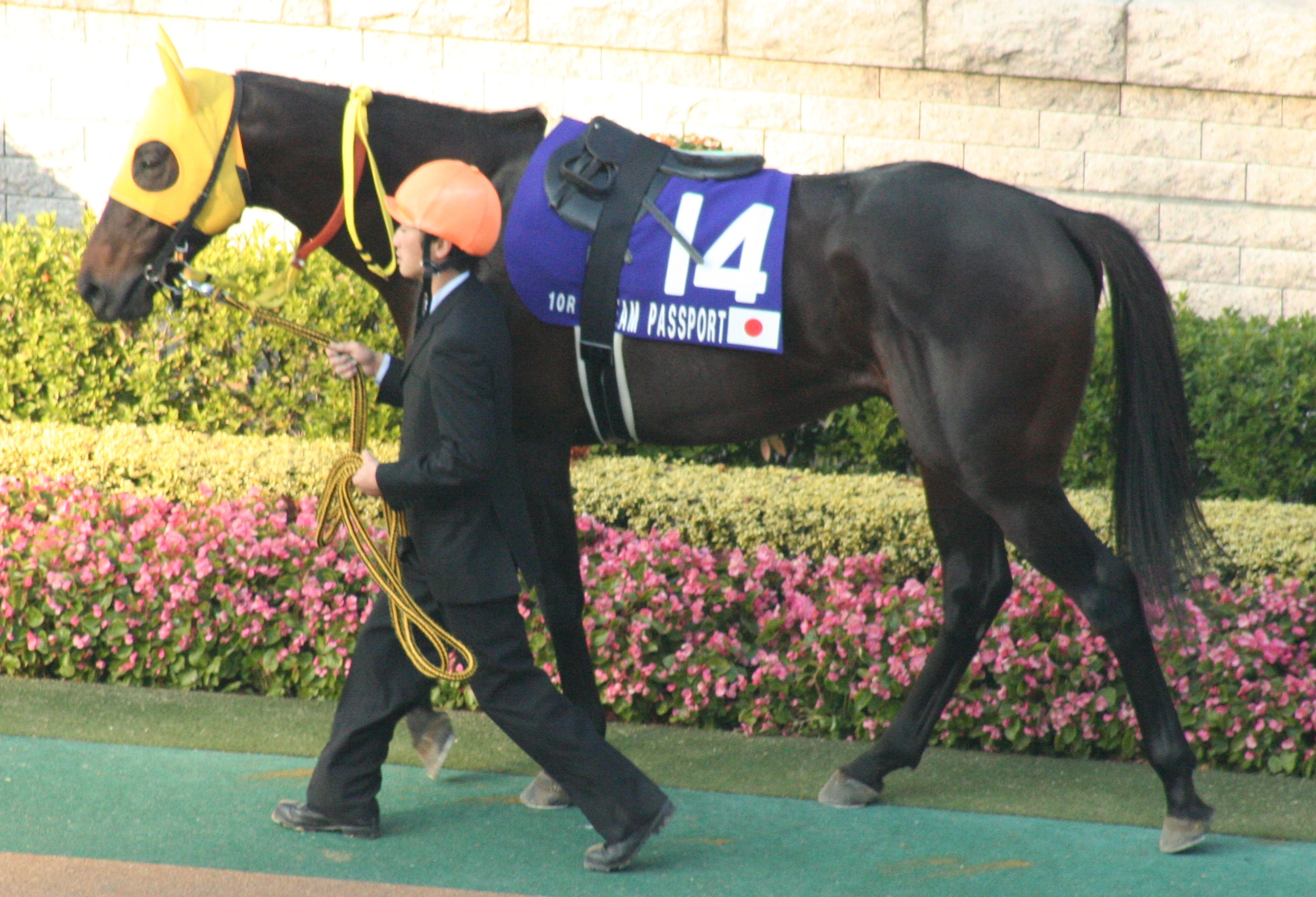 ドリームパスポート